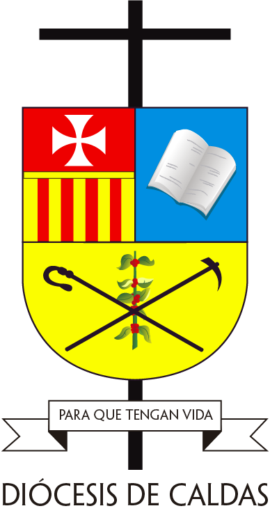 Escudo Oficial de la Diócesis de Caldas Antioquia